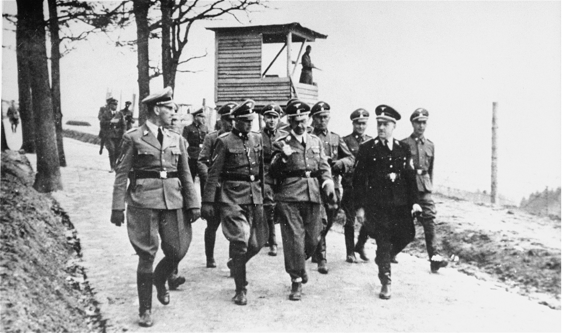 Kz Mauthausen, Besuch Heinrich Himmler, Franz Ziereis Zentralbild, 1.3.1957 Mauthausen ... Heinrich Himmler visiting Mauthausen which was opened on August 8, 1938, a few months after the Anschluss of Austria and Germany on March 12, 1938, which marked the beginning of Adolf Hitler's drive through Europe. The site for the camp was chosen by Reichsführer-SS Heinrich Himmler, the head of the SS , and the man who had authority over all the camps. The location was in farm country, but near the Wienergraben, a municipal quarry which supplied the city of Wien (Vienna) with granite stones. The quarry was near the city of Linz - April 1941. See also USHMM record. Abgebildete Personen: Himmler, Heinrich: Reichsführer der SS, Deutschland (GND 11855123X) Kaltenbrunner, Ernst Dr. jur.: SS, später (1943) Chef des Reichssicherheitshauptamtes, Deutschland Eigruber, August: Gauleiter in Oberdonau/Ostmark, Österreich (GND 127548963) Ziereis, Franz: SS-Sturmbannführer, Lagerkommandant des KZ Mauthausen, Deutschland Bachmayer, Georg: SS-Hauptsturmführer, Kommandant im KZ Mauthausen, Deutschland